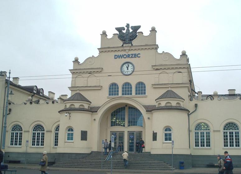 Dworzec Lublin PKP, 2007